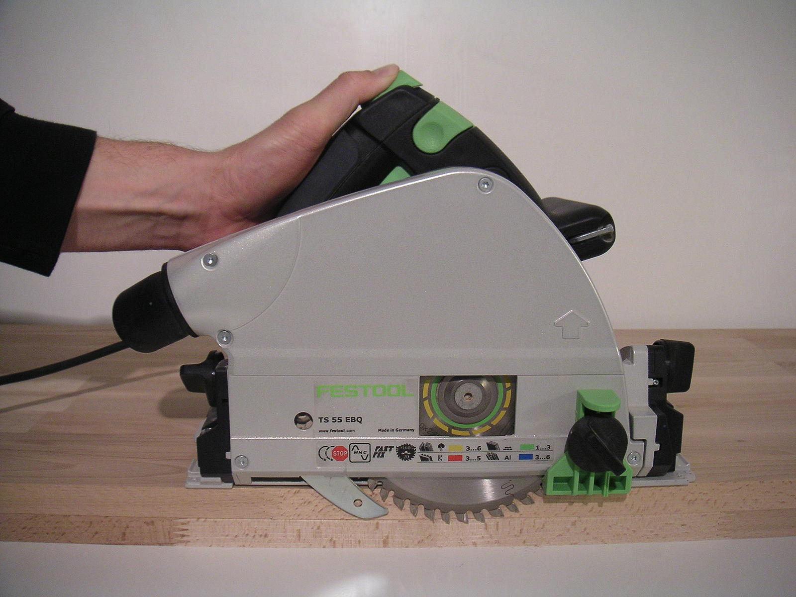 Tauchkreissäge Festool TS 55 EBQ